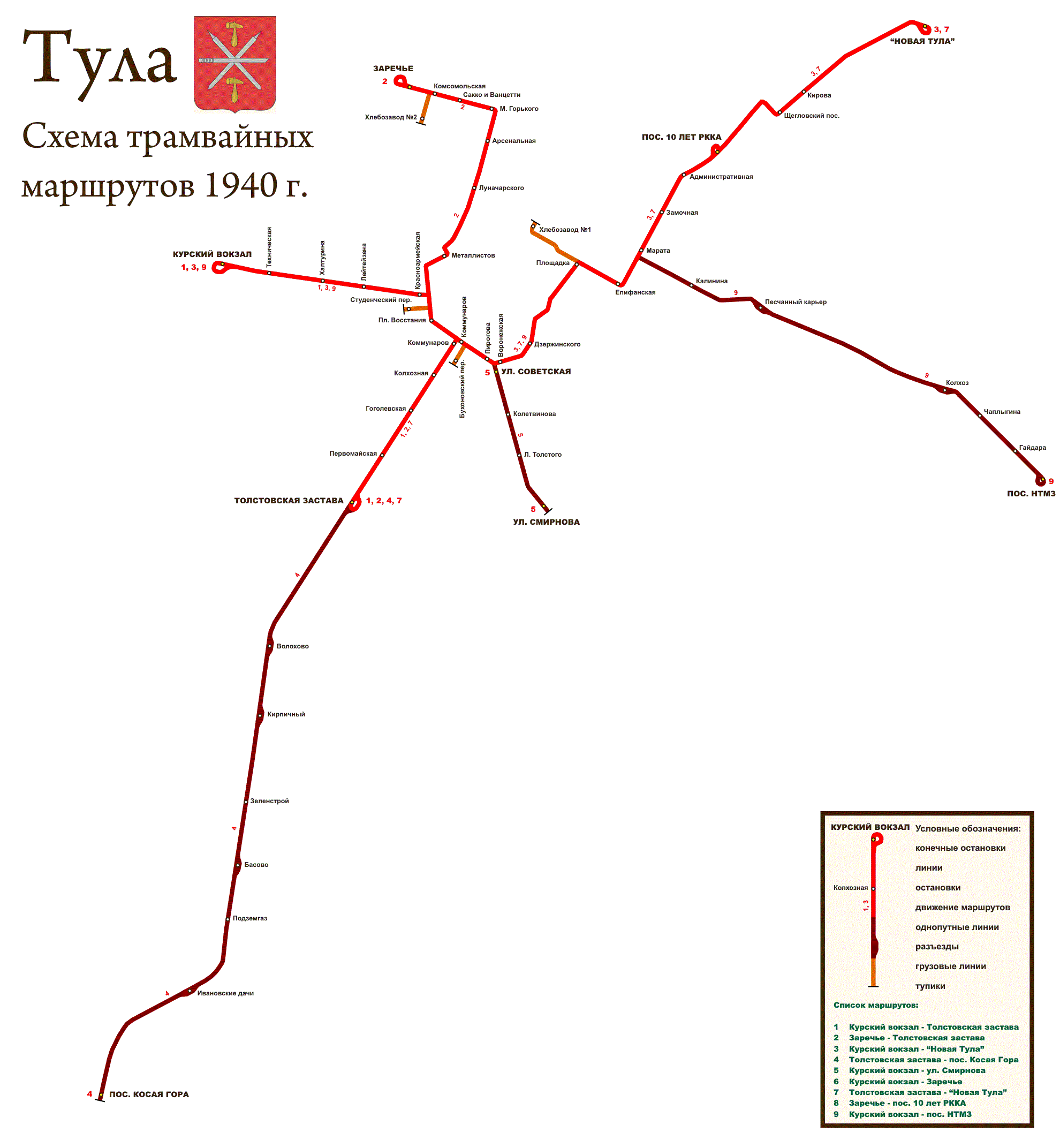 Схема тульского трамвая в 1940 году